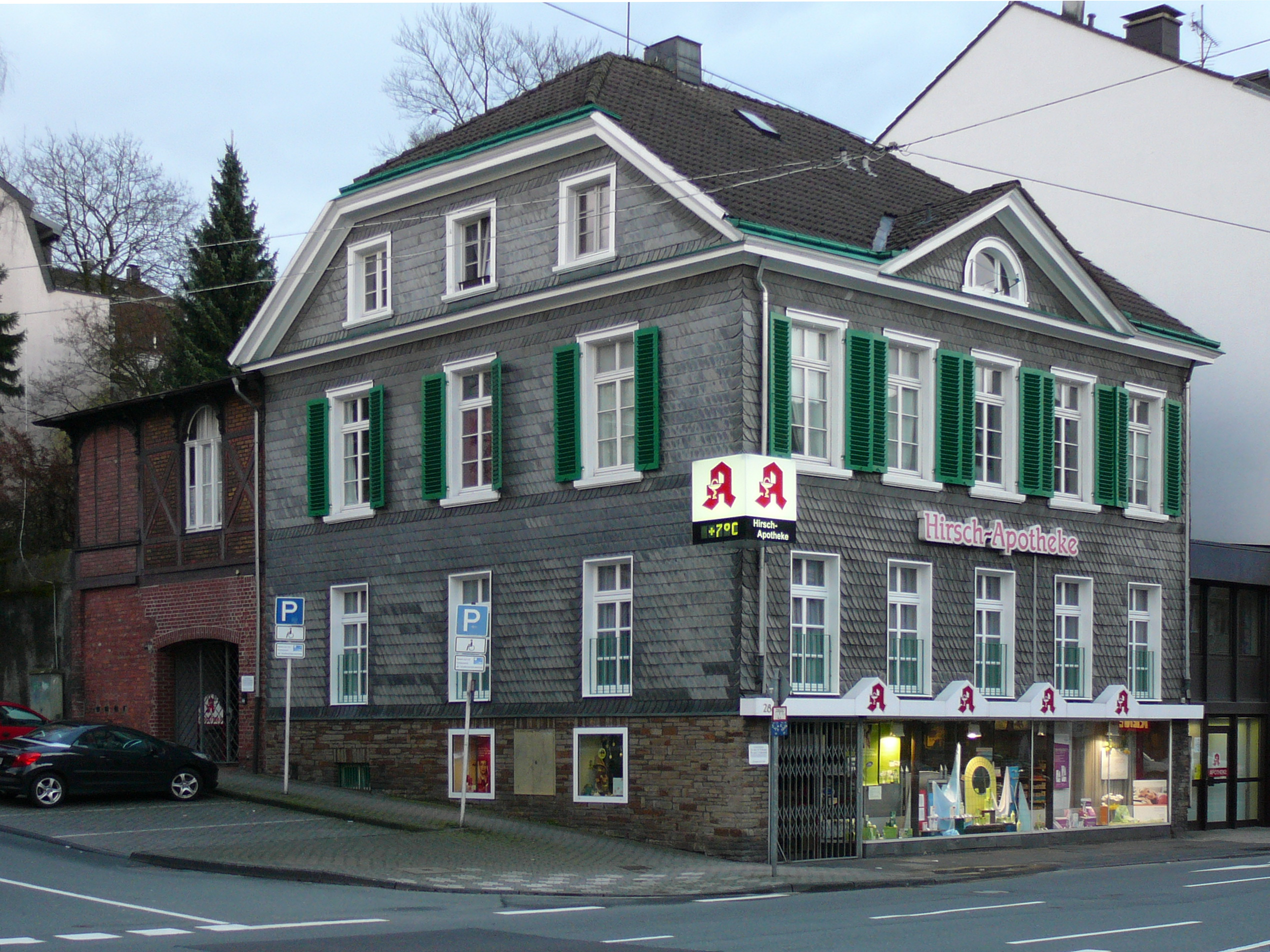 Friedrich-Engels-Allee, Wuppertal